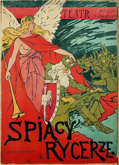 Apolinary Kotowicz, "Śpiący Rycerze" , plakat według projektu artysty (litografia kolorowa), 1898, 93,5x68 cm, Muzeum Narodowe, Kraków Poster for "The Sleeping Knights" by Sydon Friedberg (1857-1931)